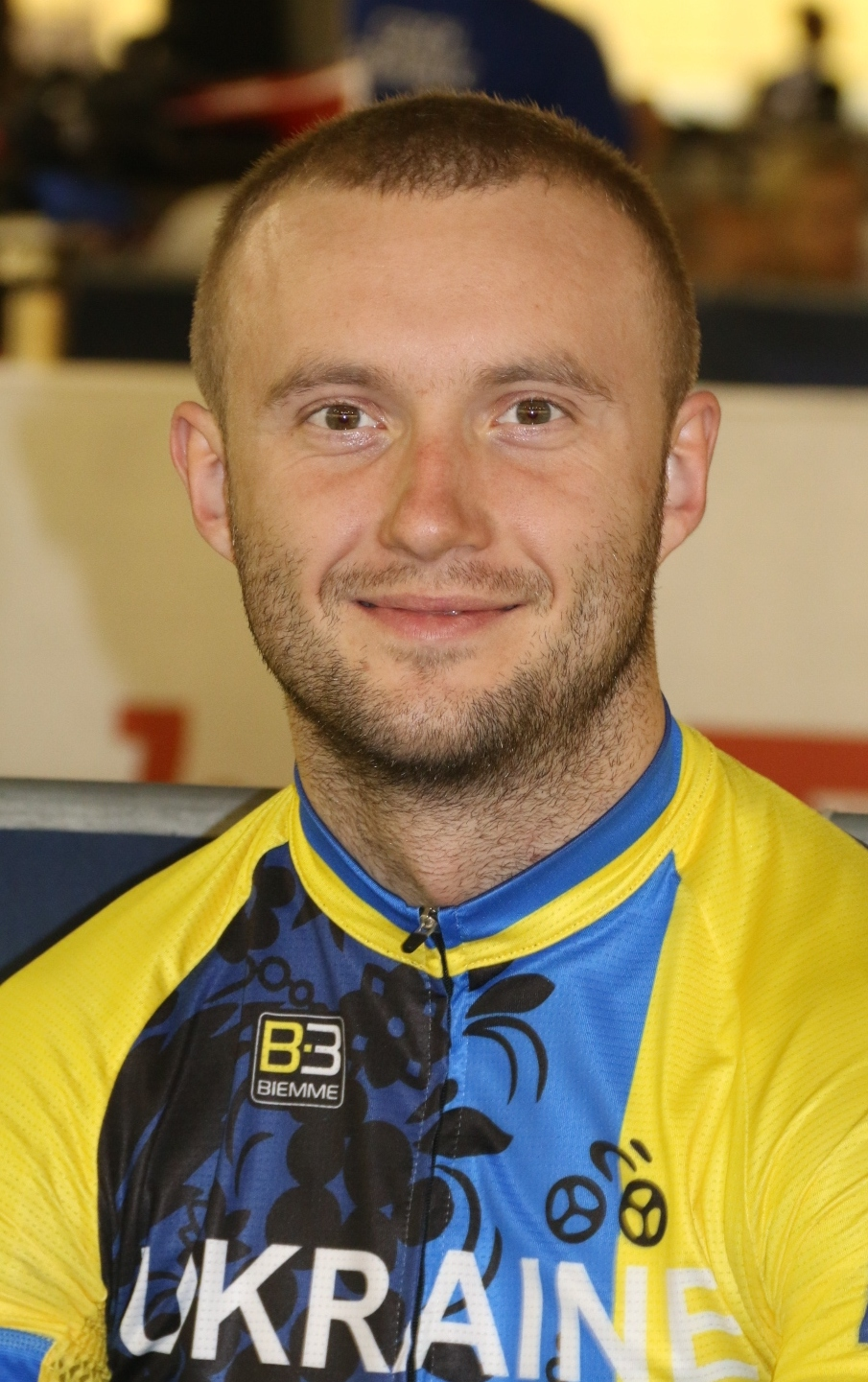 Andriy Kutsenko, ukrainischer Radsportler